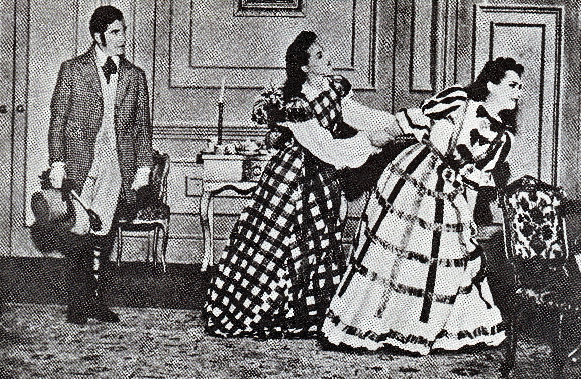 André Huguenet, Hermien Dommisse en Paula Styger in Helshoogte, 'n vertaling van Emily Bronte se Wuthering Heights (1943.)